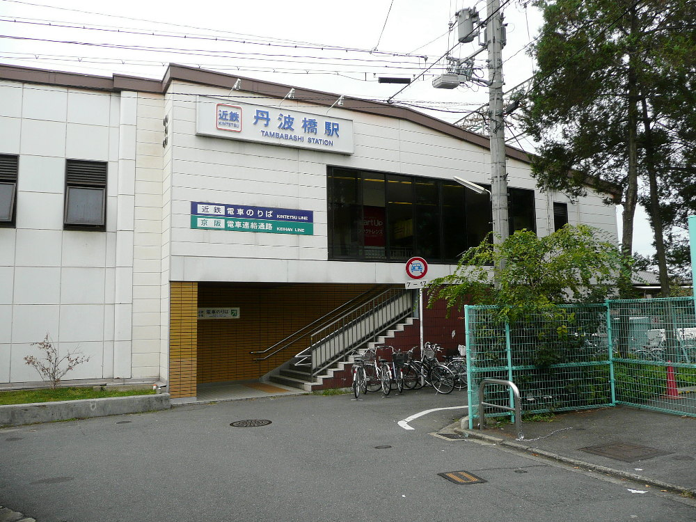 近畿日本鉄道京都線近鉄丹波橋駅東口 投稿者↑PON（ウエポン）が2007年10月14日に撮影 一部編集の上で2007年10月22日 (月) 02:19 (UTC)にアップロード